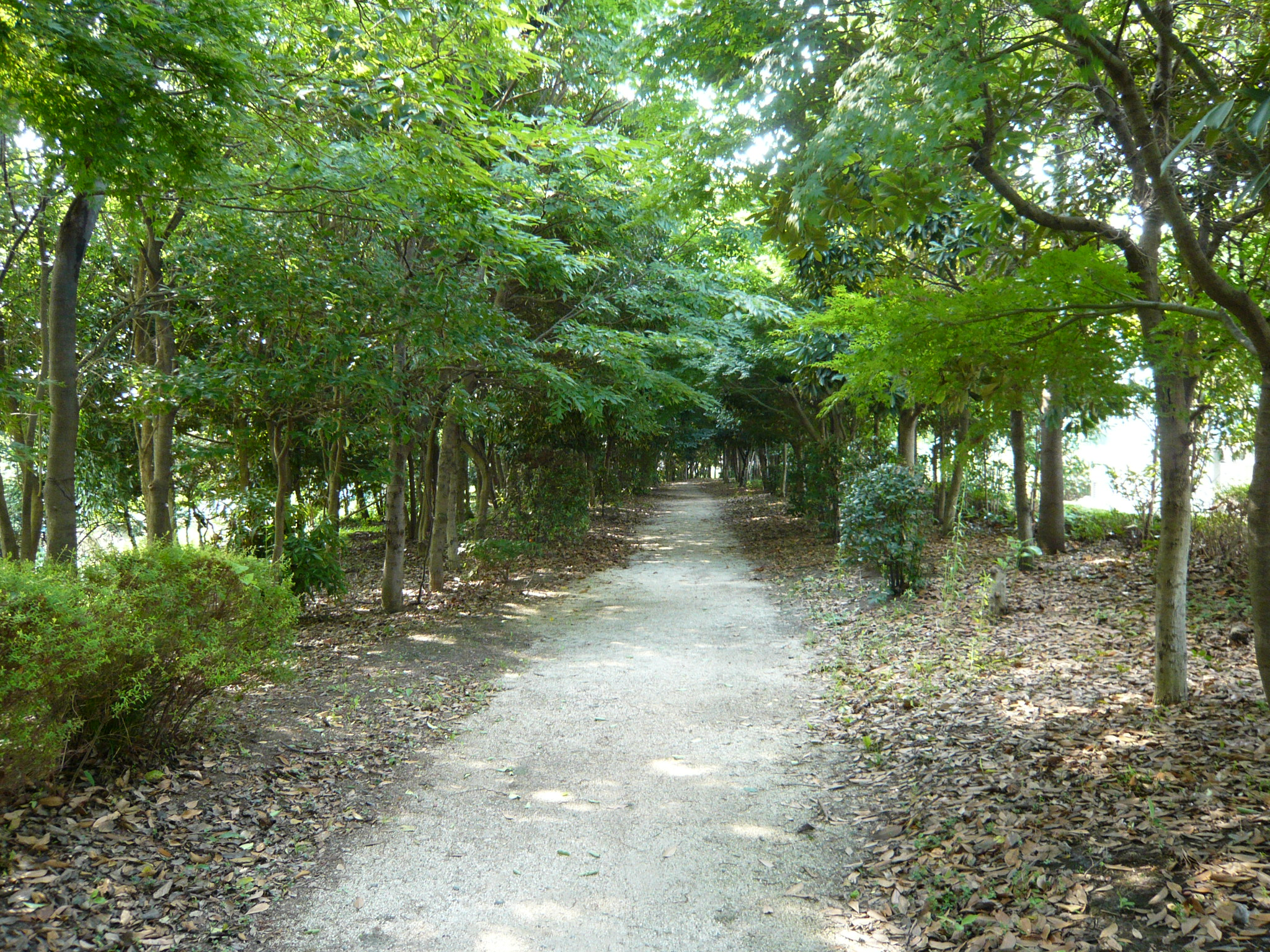 Aomi-Ryokudou-Kouen (Aomi Green Park) in Koto-ku, Tokyo, Japan.